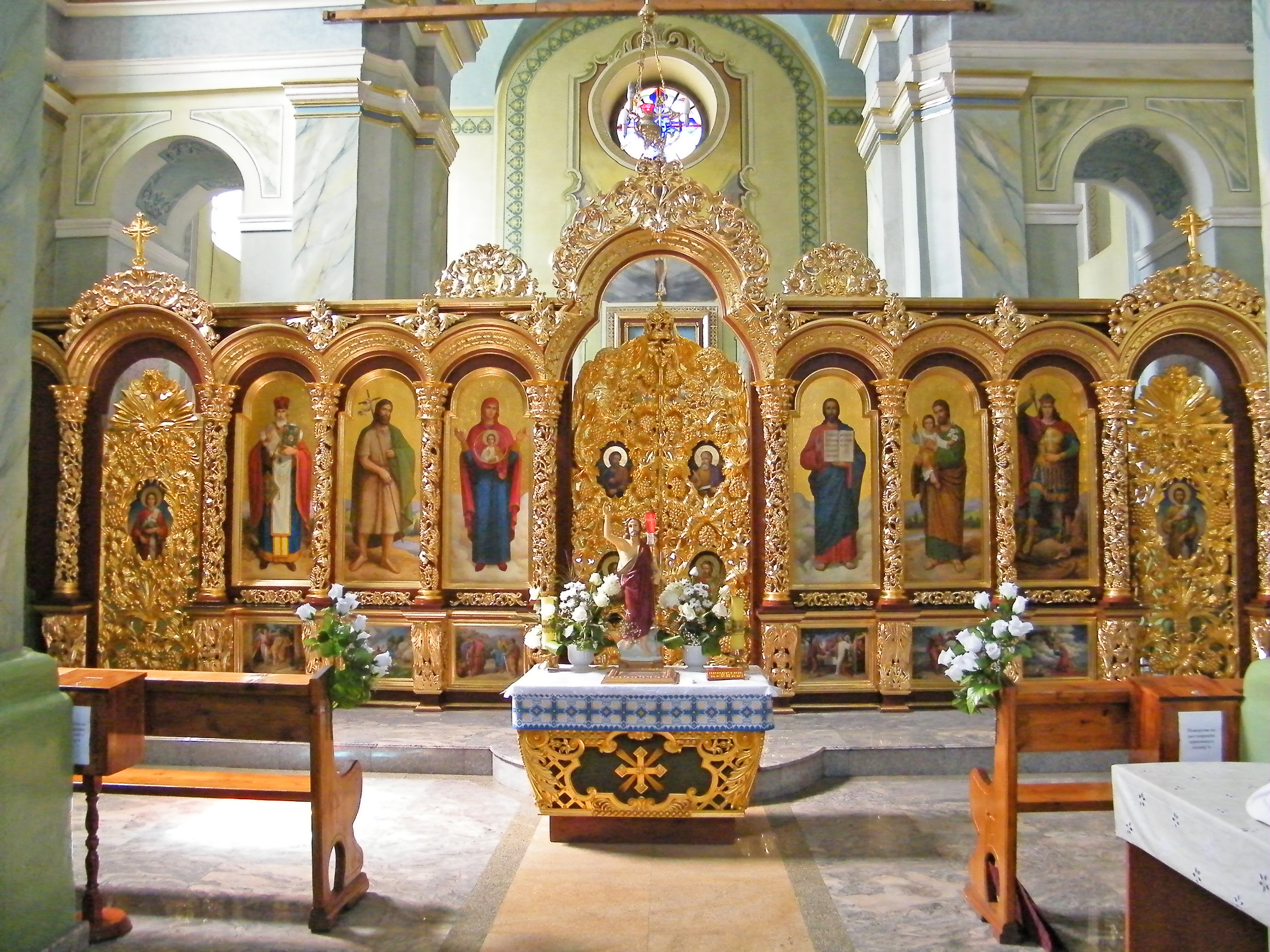 Храм Святого Юра в Червонограде